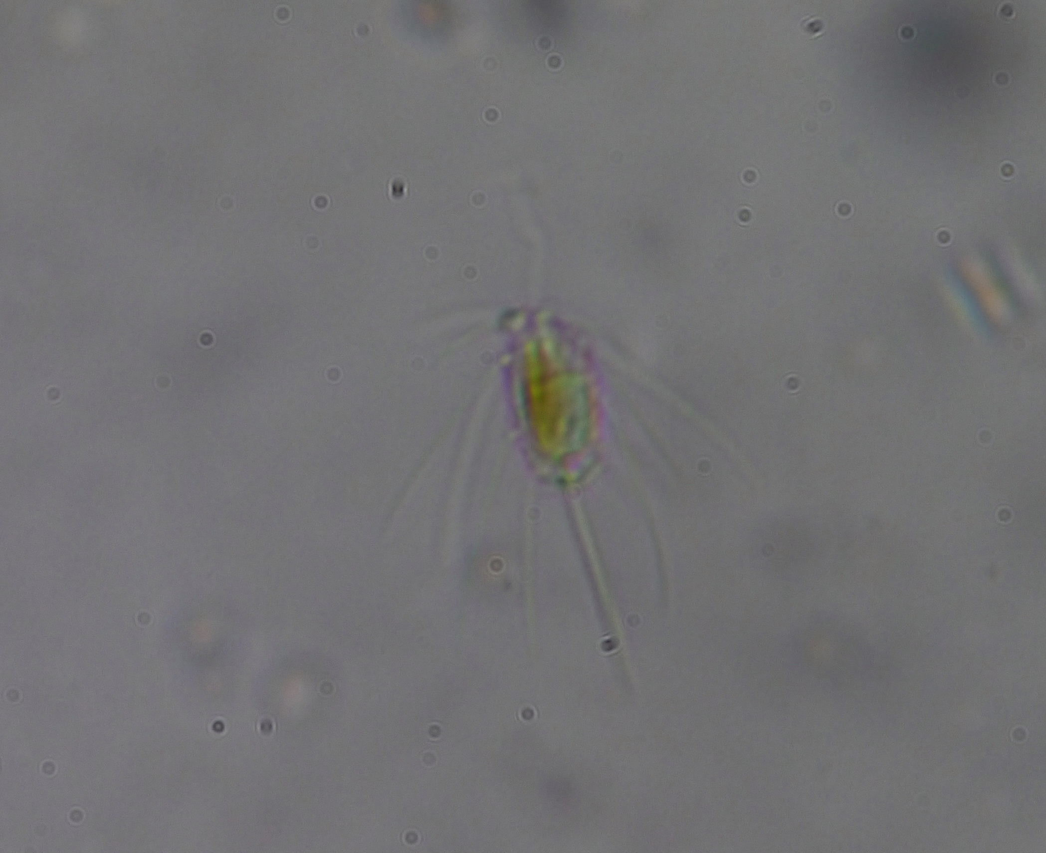 Ｍａｌｌｏｍｏｎａｓ ｓｐ．：ミノヒゲムシの１種 2015/01/30 和歌山県田辺市：Tanabe City. Wakayama Pref. Japan